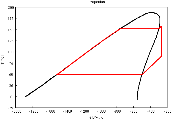 Szerves Rankine-ciklus izopentán közeggel